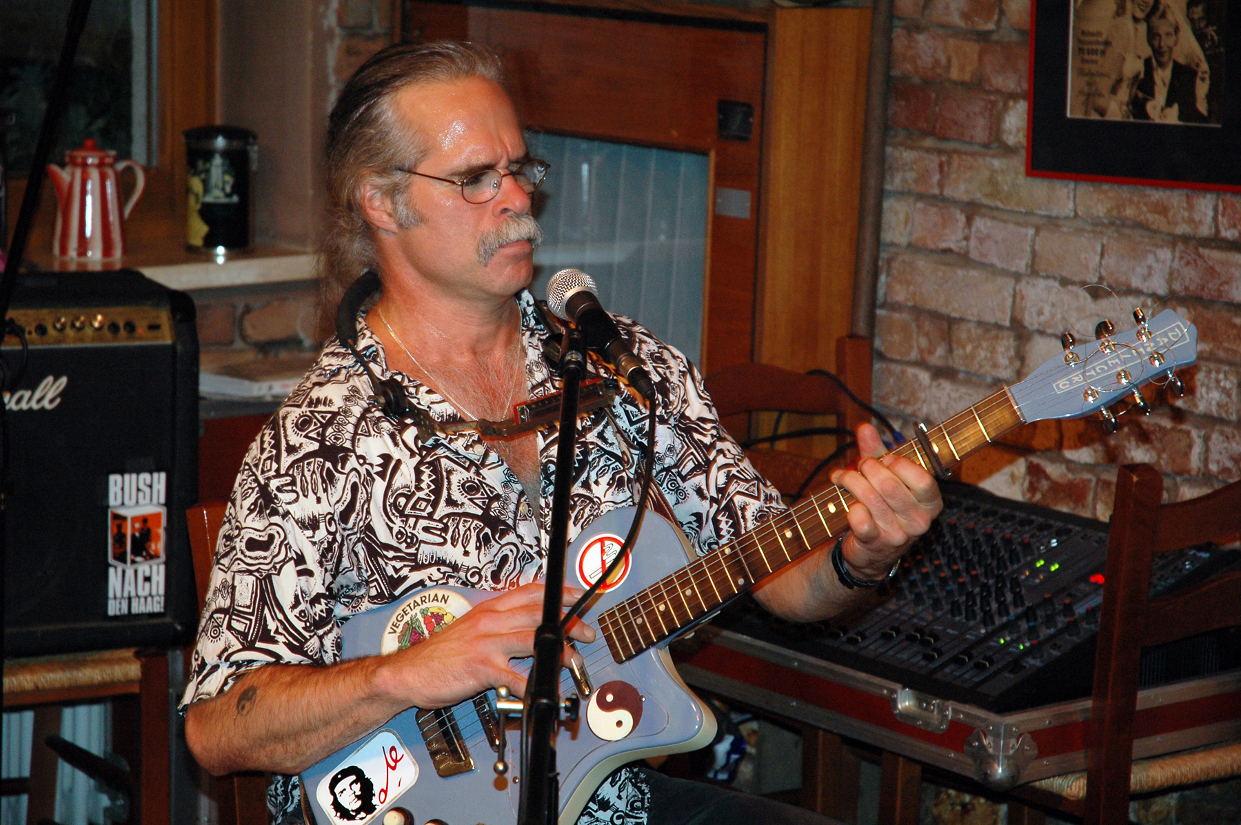 Tom Shaka am 04.10.2004 bei einem Konzert zusammen mit Toni Sheridan